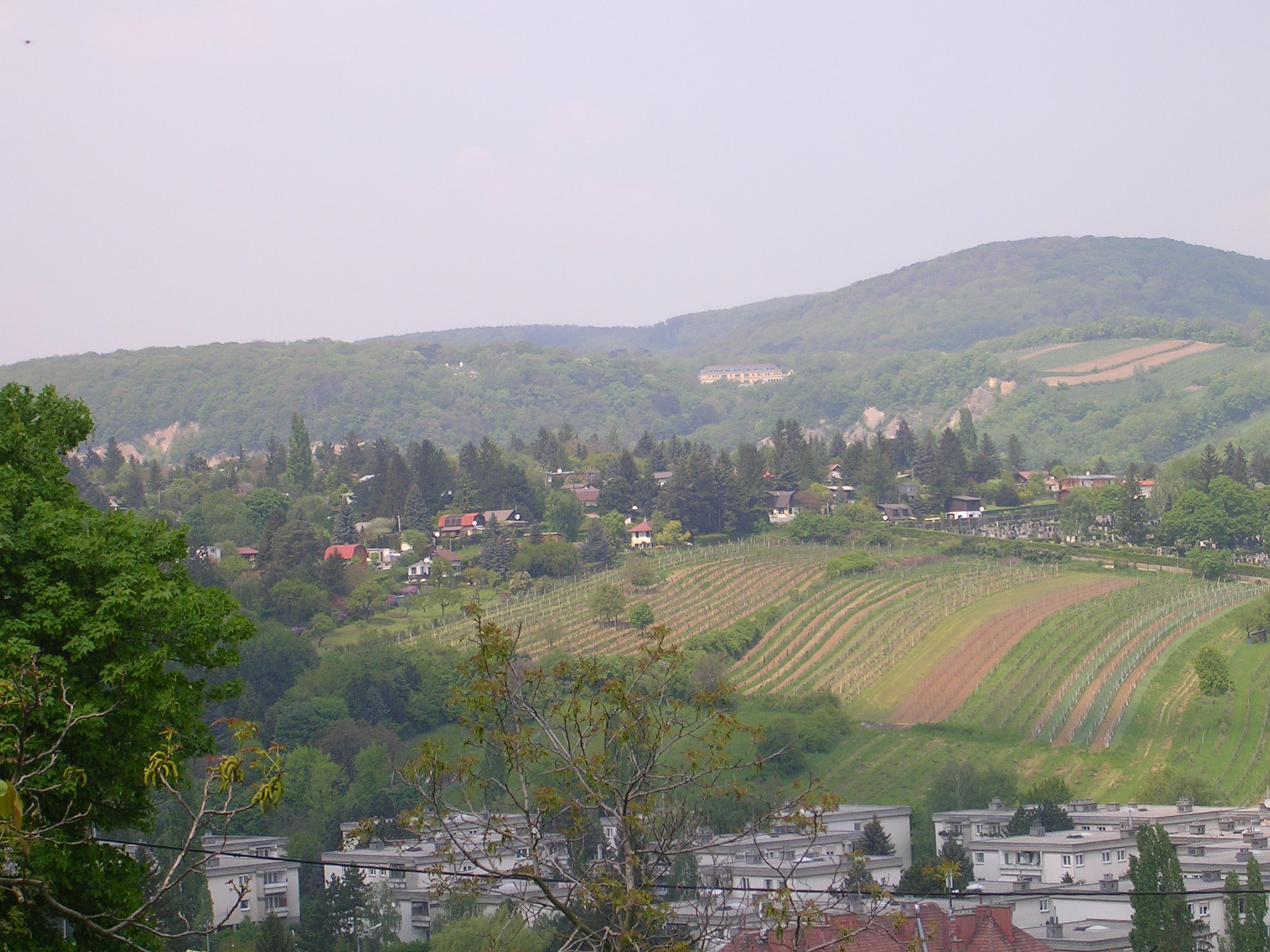 Hackenberg, seen from Dr.-Meißner-Park